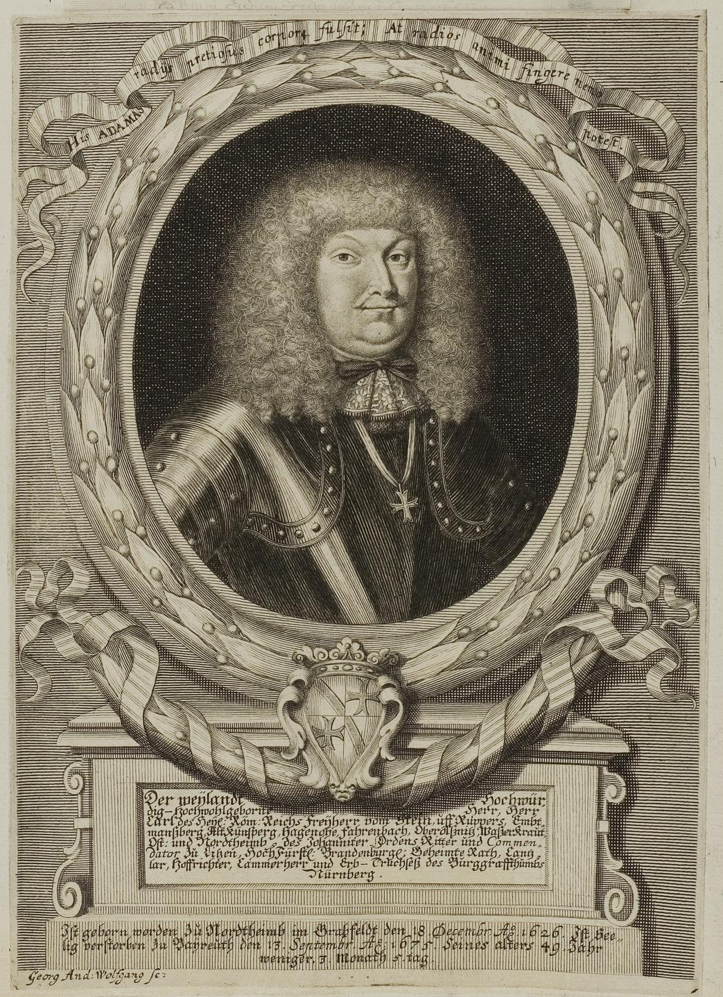 Grafik aus dem Klebeband Nr. 1 der Fürstlich Waldeckschen Hofbibliothek Arolsen Motiv: Carl Vom Stein (1626–1675), 1646 Defendent an der Univ. Altdorf; Brandenburg-Kulmbachischer Geheimer Rat